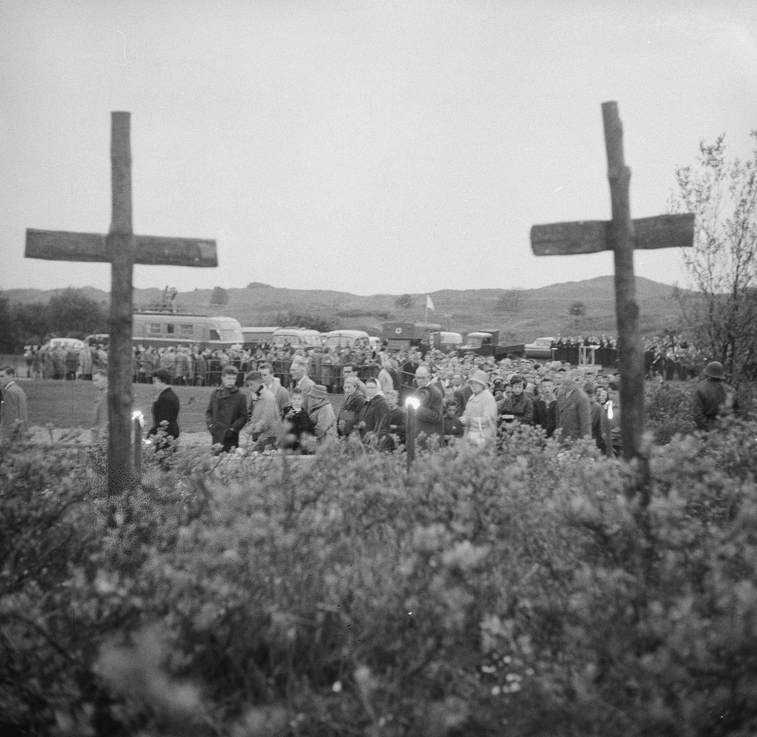 Collectie / Archief : Fotocollectie Anefo Reportage / Serie : [ onbekend ] Beschrijving : Dodenherdenking op de Waalsdorpervlakte Datum : 4 mei 1961 Locatie : Den Haag Trefwoorden : dodenherdenkingen Fotograaf : Nijs, Jac. de / Anefo Auteursrechthebbende : Nationaal Archief Materiaalsoort : Negatief (zwart/wit) Nummer archiefinventaris : bekijk toegang 2.24.01.03 Bestanddeelnummer : 912-4492